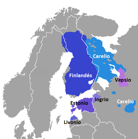 lenguas fino-bálticas